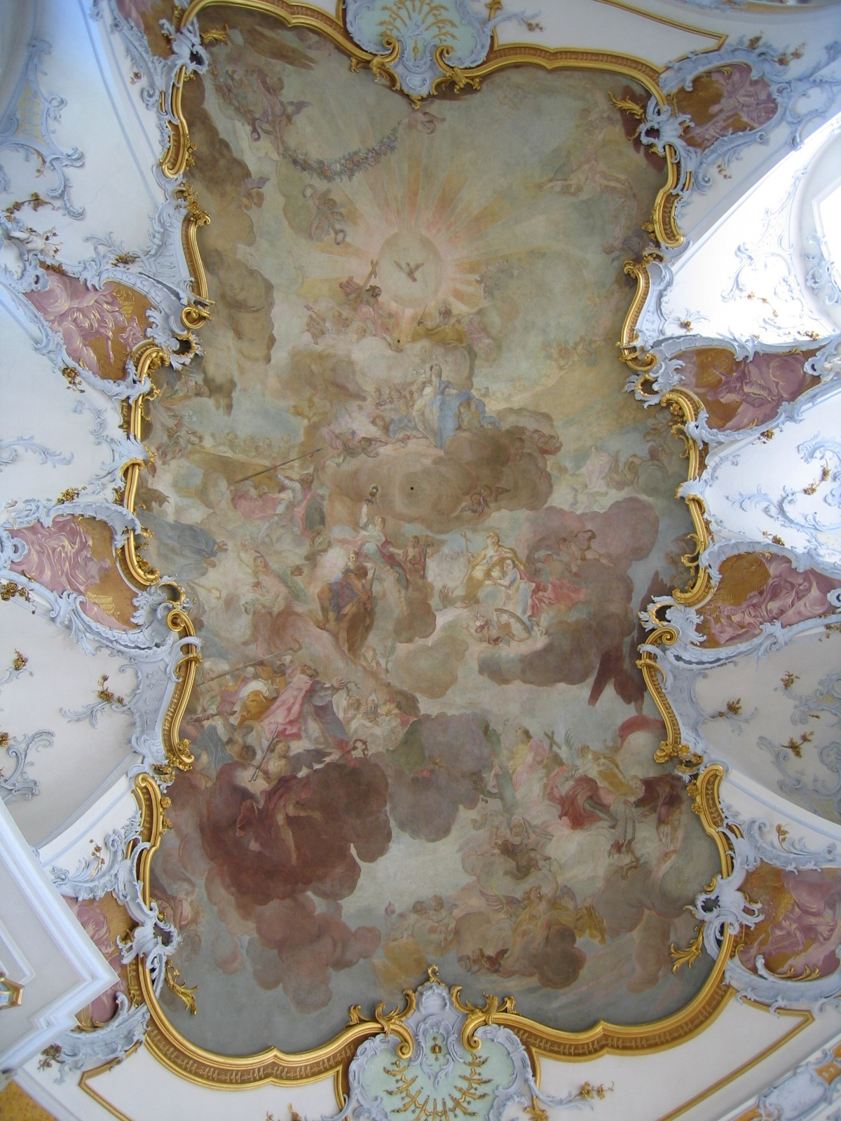 Deckenbild in der Basilika Vierzehnheiligen (Germany). Fresko von Joseph Ignaz Appiani. Stuck von Franz Xaver Feuchtmayer d. Ä., Johann Georg Üblher und (ab 1763 allein) Johann Michael Feuchtmayer d. J., ab 1759. Joseph Ignaz Appiani (1706–1785) Alternative namesAppiani, Giuseppe IganzioDescription German painter Date of birth/death16 October 170619 August 1785Location of birth/deathMunichTriefensteinAuthority control VIAF: 8262580 GND: 122184831 Franz Xaver Feuchtmayer the Elder (1698–1764) Alternative namesFeichtmayrDescription German sculptor Date of birth/death11 August 1698 (baptised)before 28 April 1764Location of birth/deathWessobrunnAugsburgAuthority control VIAF: 50073121 GND: 121087468 Johann Georg Üblher (1703–1763) Alternative namesYbelherr, Johann Georg; Üblhör, Johann GeorgDescription German sculptor Date of birth/death23 March 170327 April 1763Location of birth/deathGaispoint bei WessobrunnMaria Steinbach bei Legau Johann Michael Feuchtmayer (1696–1772) Alternative namesJohann Michael Feichtmayr (3)Description German sculptor Date of birth/death17 October 16964 June 1772Location of birth/deathHaid bei WessobrunnAugsburgAuthority control VIAF: 37716385 LCCN: nr94017622 GND: 118974459 WorldCat